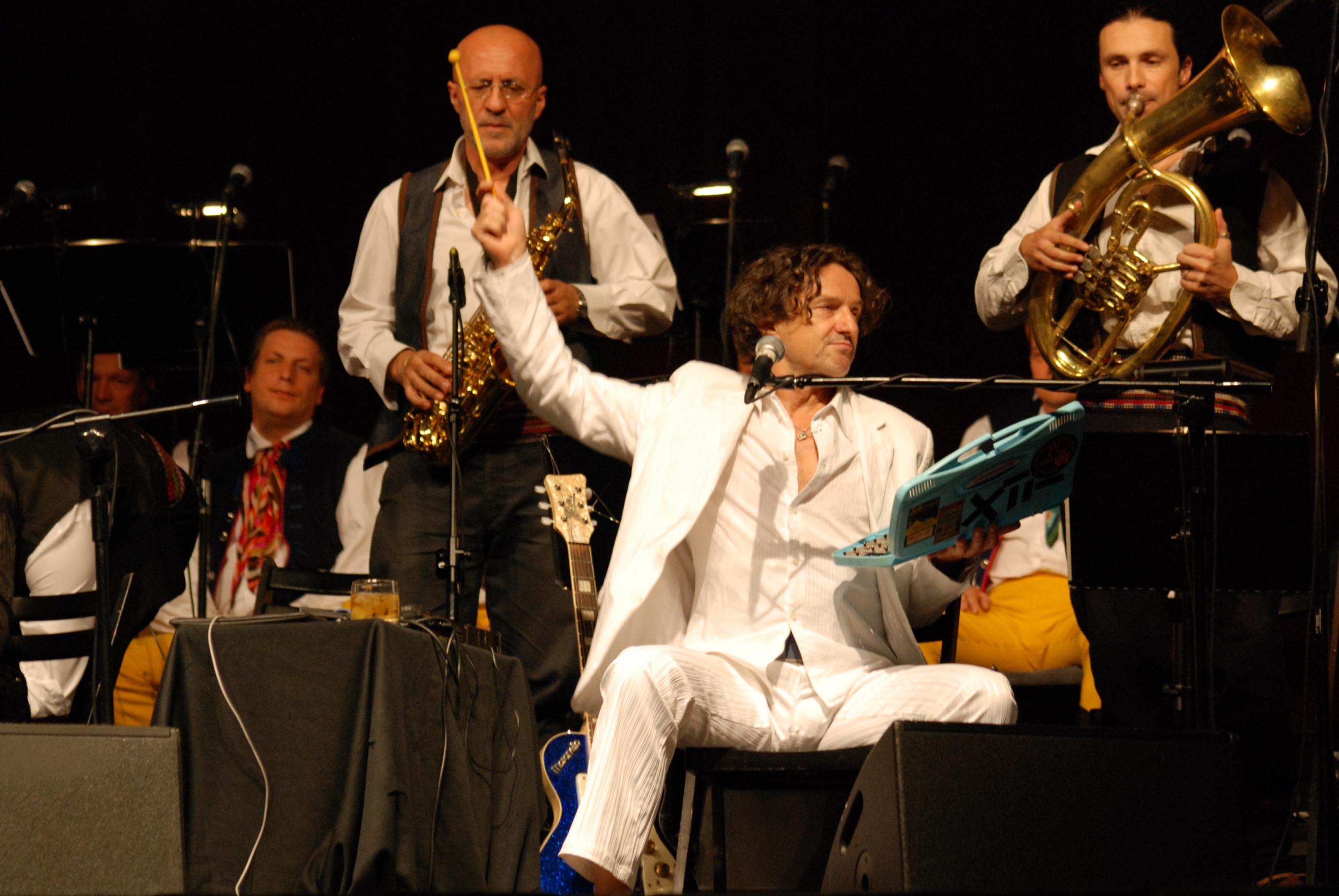 Jubileuszowy koncert Zespołu Pieśni i Tańca "Śląsk" oraz Gorana Bregovića wraz z "Wedding & Funeral Orchestra"